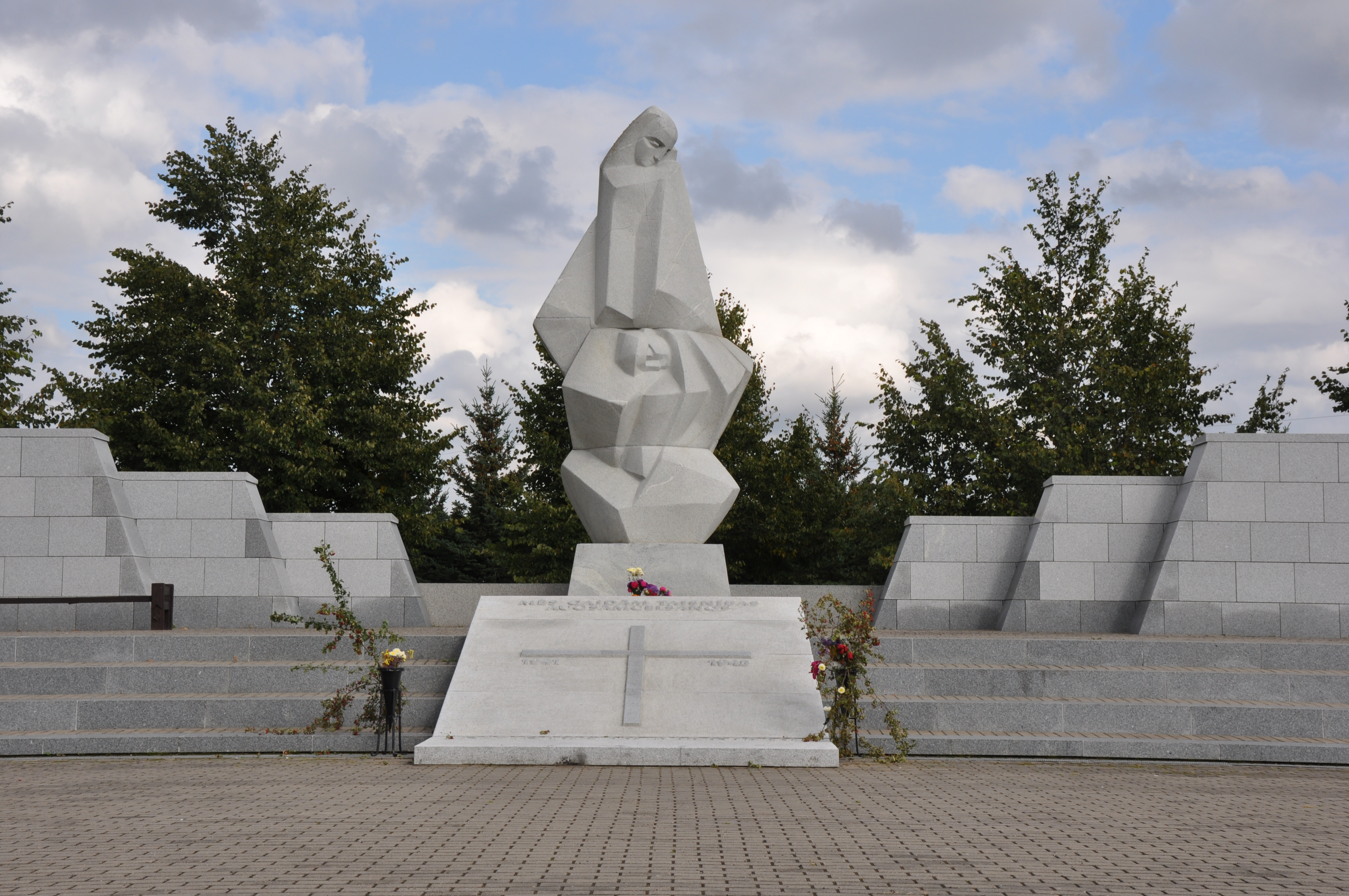 Latviešu leģiona karavīru brāļu kapi, WWII, Lestene, Lestenes pagasts, Tukuma novads, Latvia